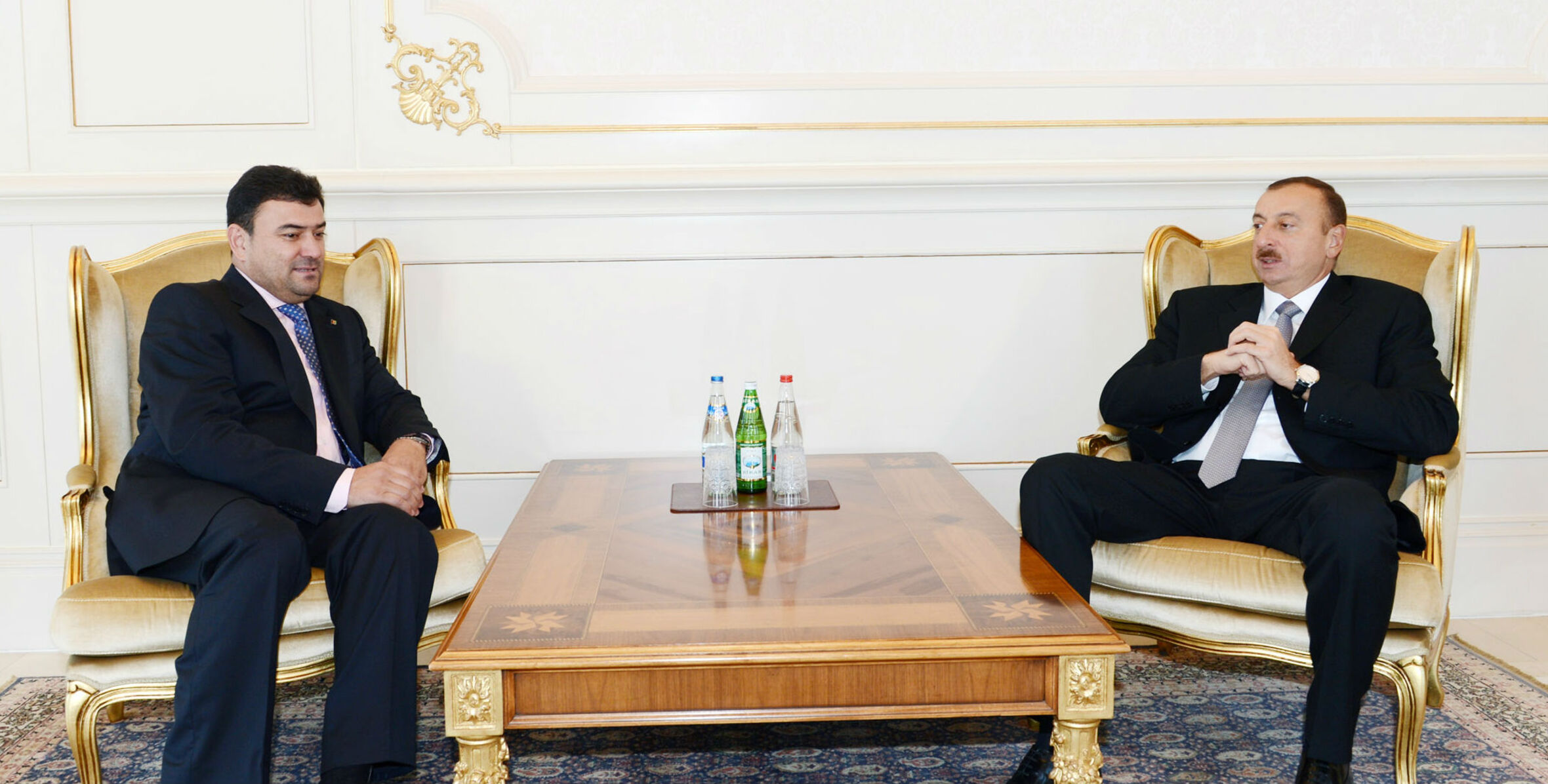 Мохаммад Шакир Каргар на встрече с Президентом Азербайджана Ильхамом Алиевым